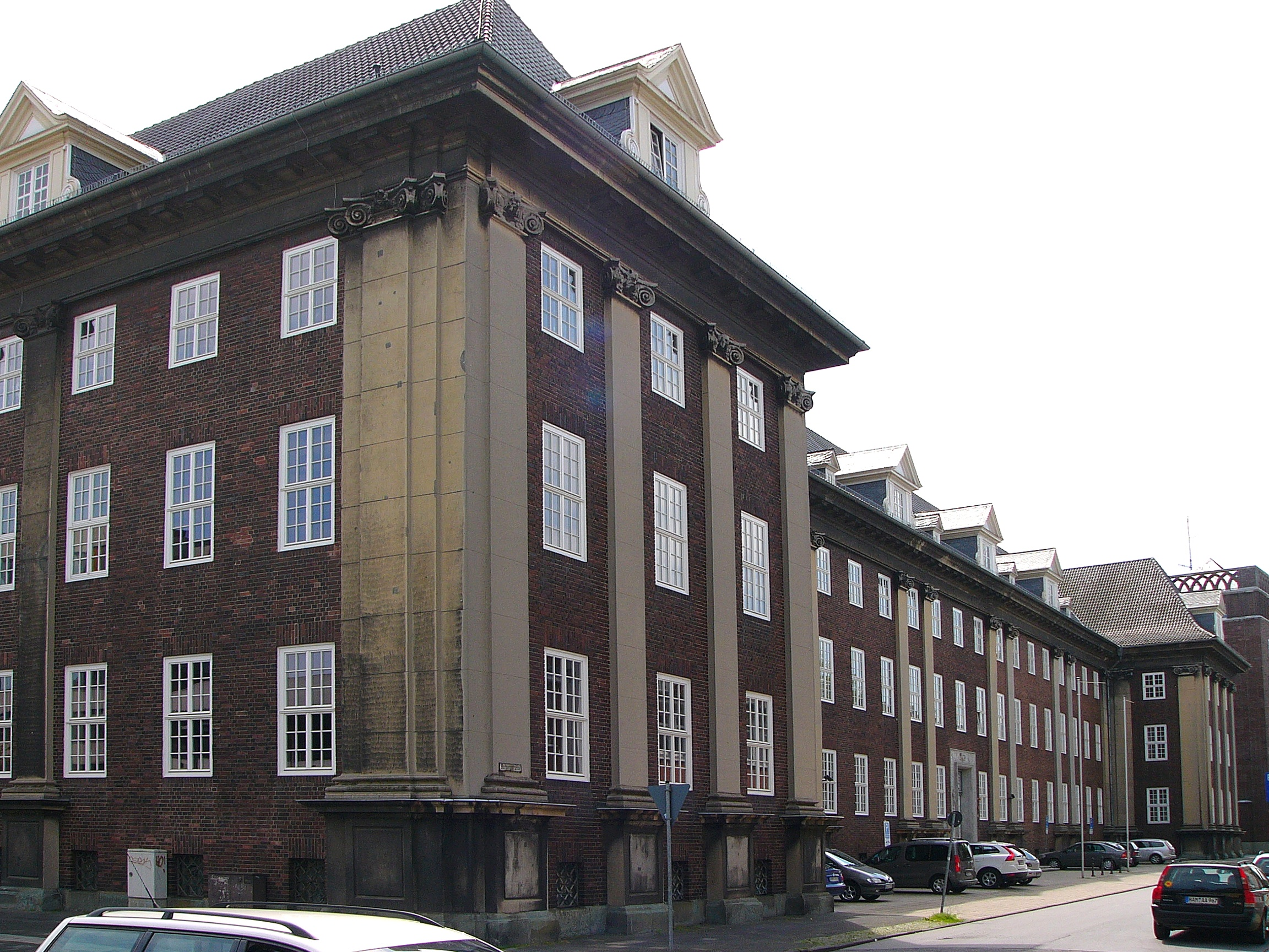 Amtsgericht Hamm This is a photograph of an architectural monument., no. 2